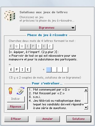 Copie d'écran du jeu de lettre « Bigramme » intégré dans le logiciel « Dico Malin »